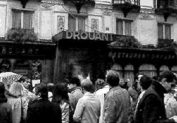 Prix de littérature française au drouant